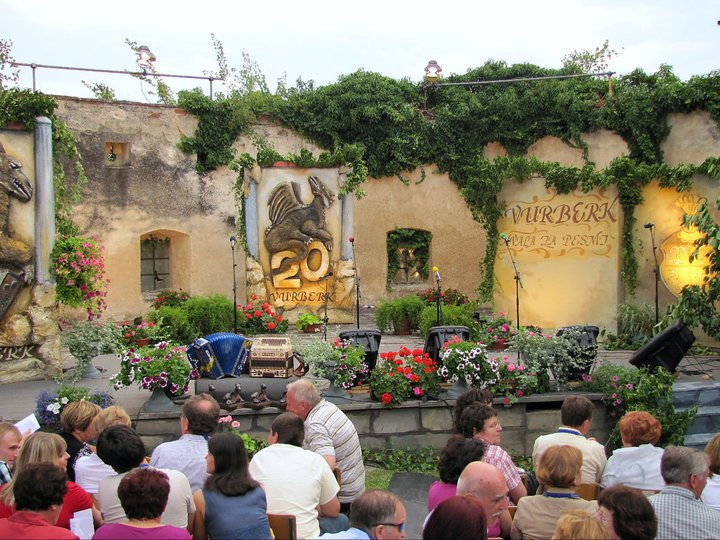 Scena na 20. festivalu Vurberk.